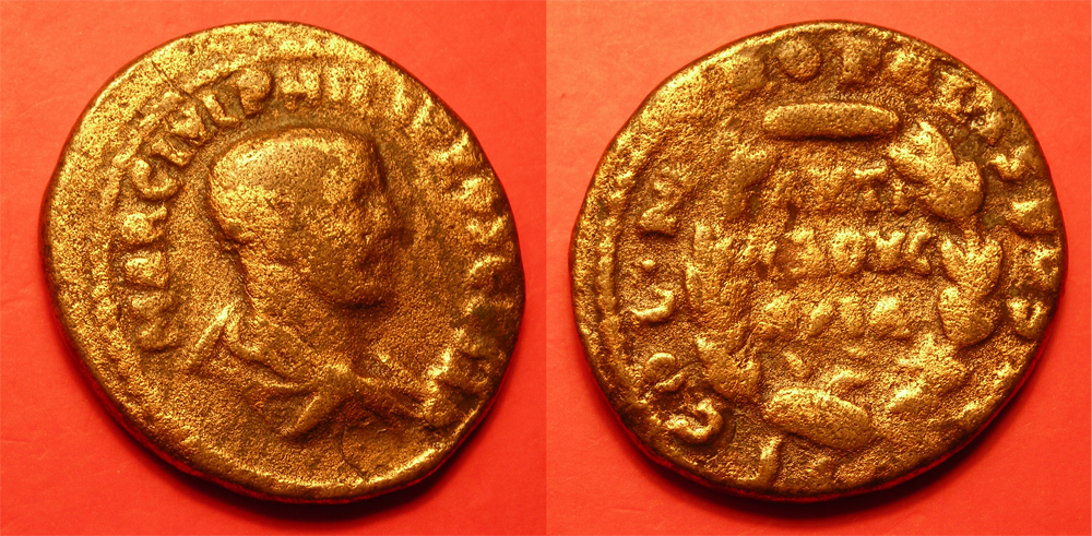 Felipe I "El Árabe". Bronze, Colonia Bostra, Arabia. 30mm, 14.5g. Anverso: MARC IVL PHILIPPOS CESAR Reverso: COL·M TROPOLIS BOSTRA ; al interior de laureles se lee: AKTI AΔOV CAPIA.